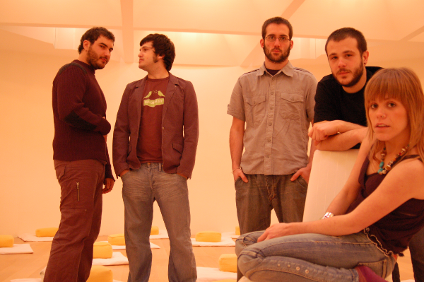 Nun Taldea